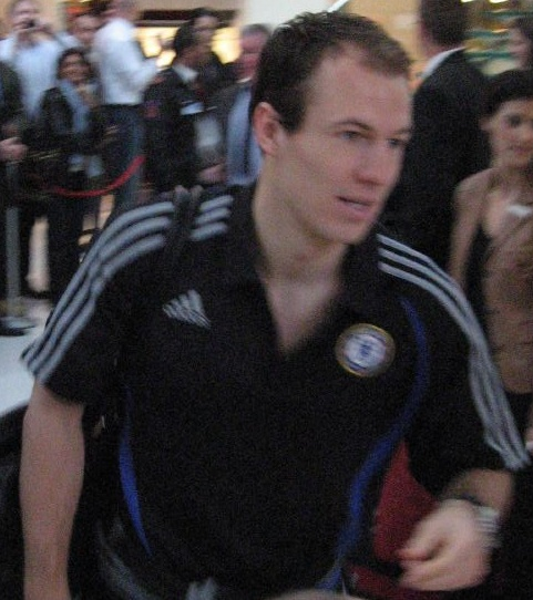 Arjen Robben